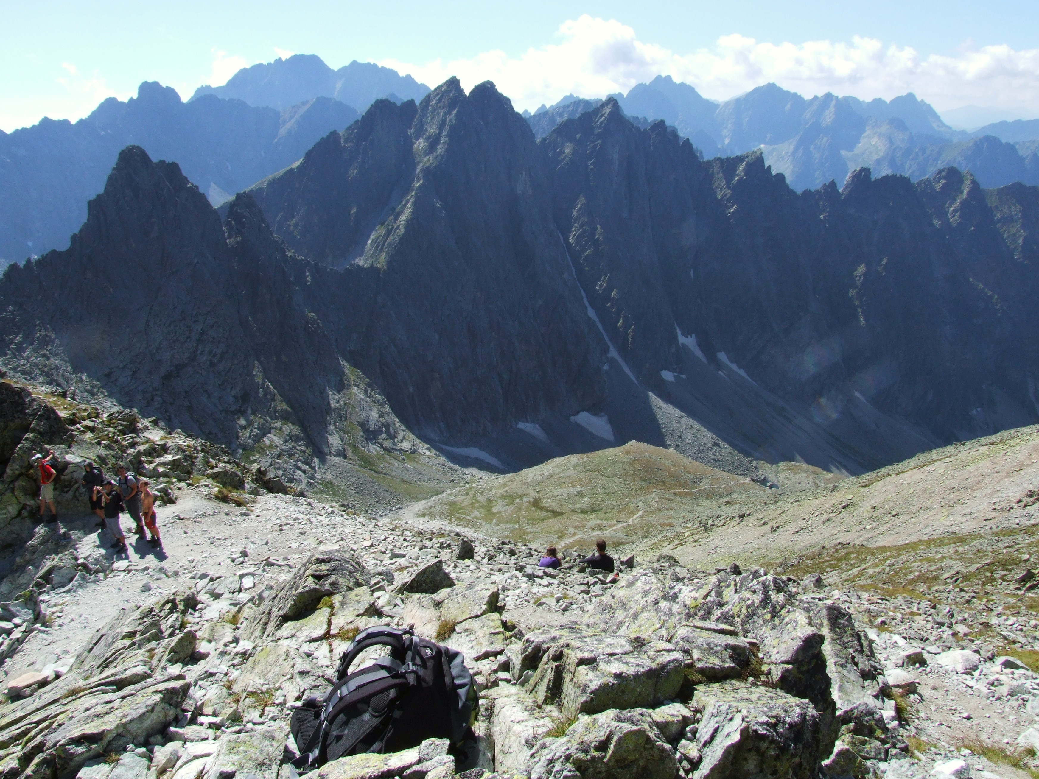 Lodowa Przełęcz. Widok na Jaworową Grań